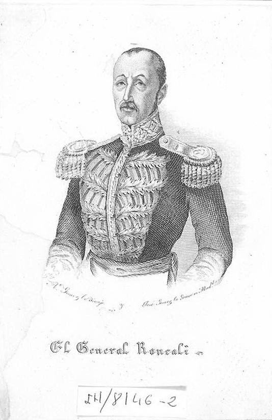 Retrato del general Federico Roncali Ceruti, dibujo de Antonio Gómez Cros grabado por José Gómez. Biblioteca Nacional de España